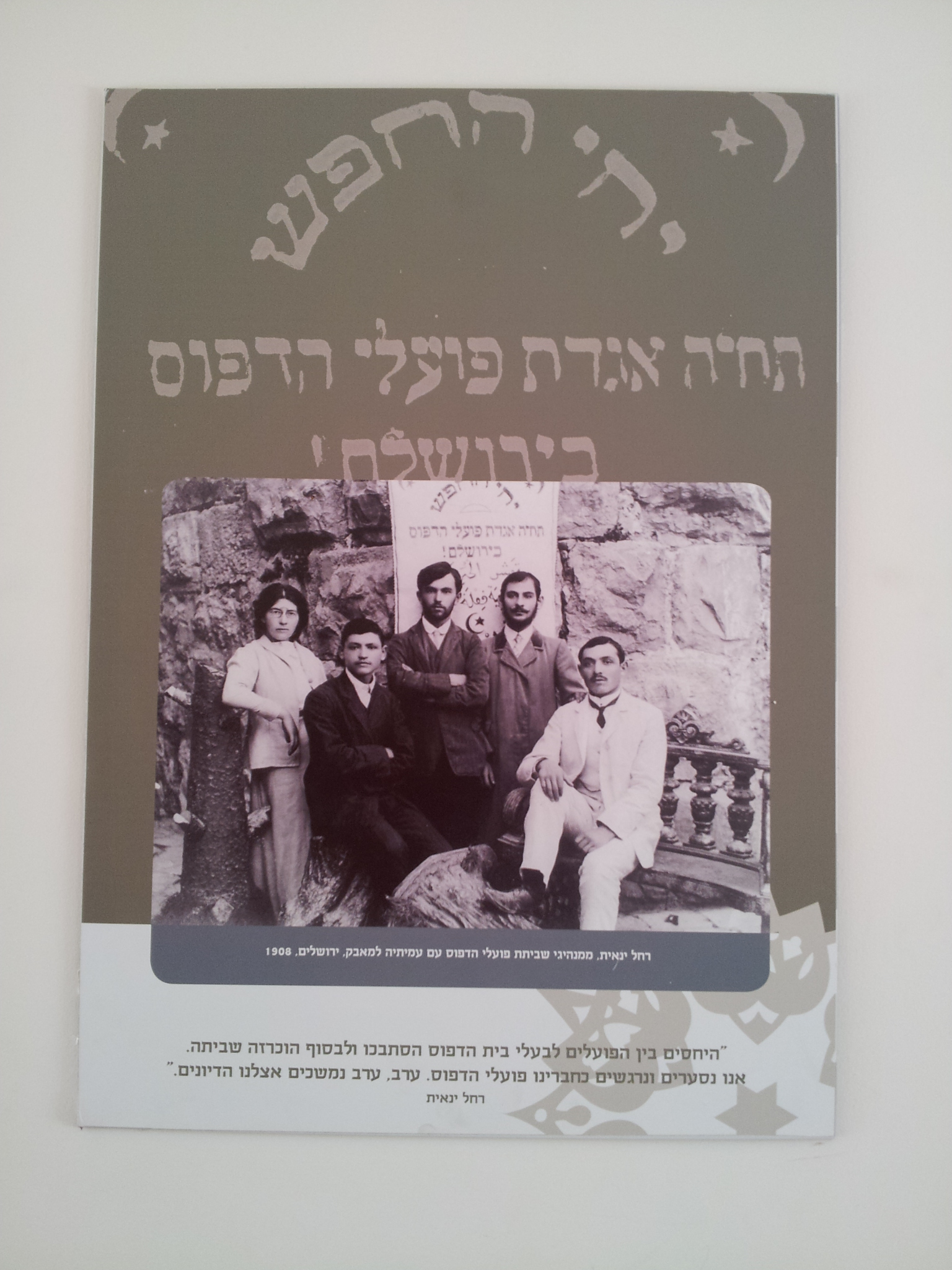 אנשי העלייה השניה: אגודת פועלי הדפוס בירושלים: מוצג בצריף הנשיא